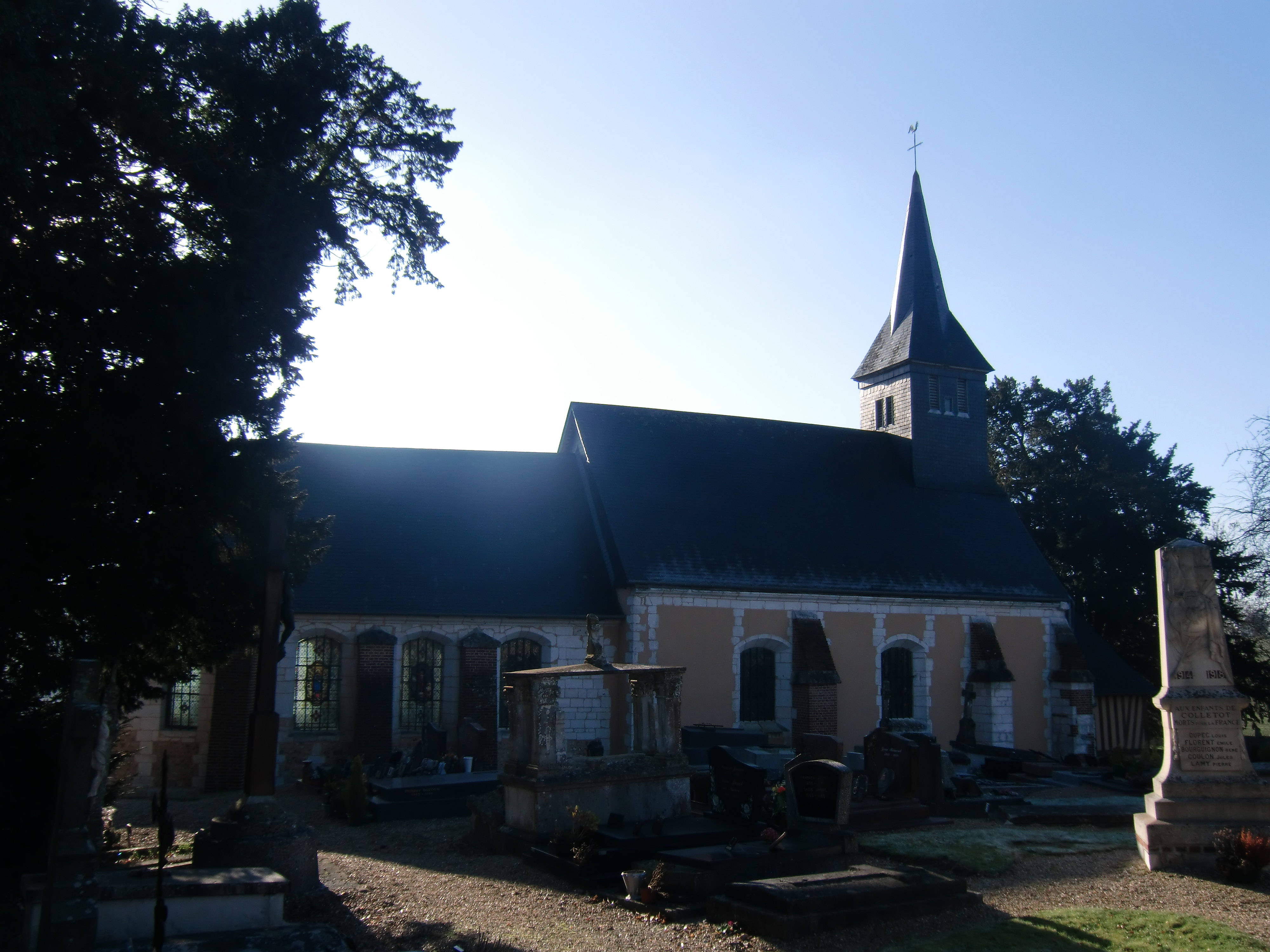 Eglise de Colletot (Eure, Normandie, France)